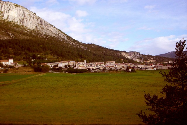 Caille, le village